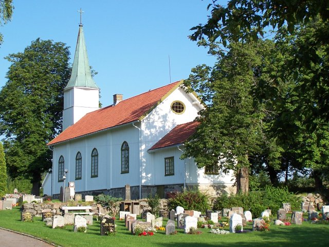 Nordby kirke i Ås kommune, Akershus, Norway